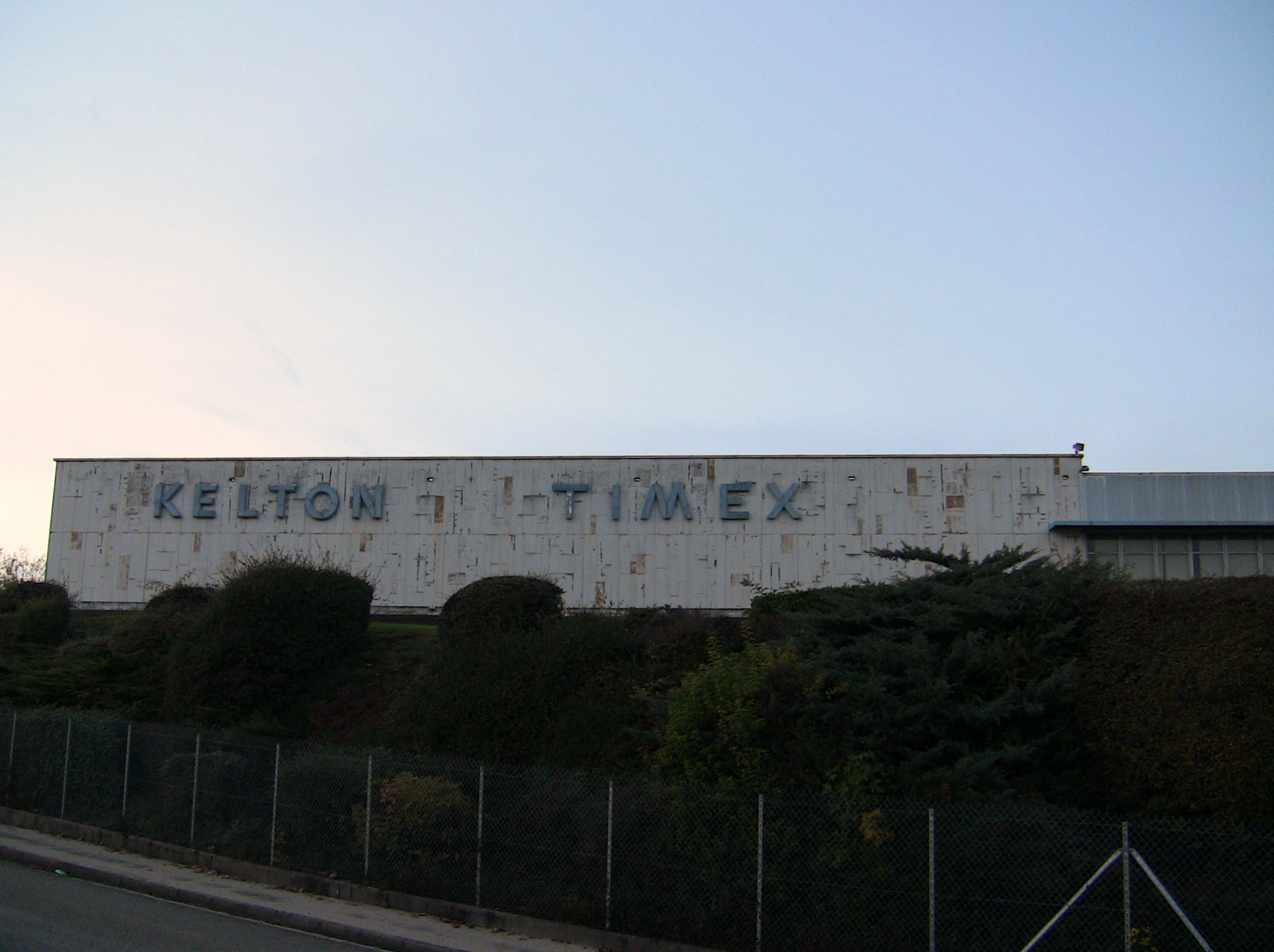 L'ancienne usine Kelton-Timex de Besançon (Doubs, France).